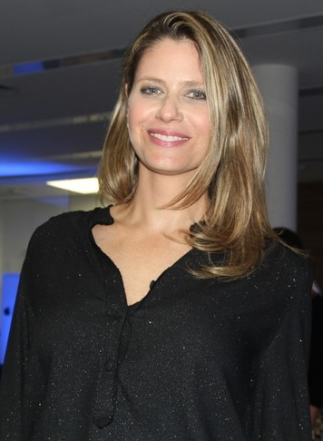 Didi Wagner na loja da TIM do Shopping Eldorado em São Paulo para o lançamento do novo Iphone 6.